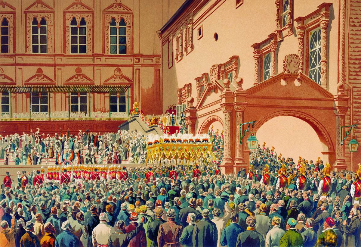 Государь император